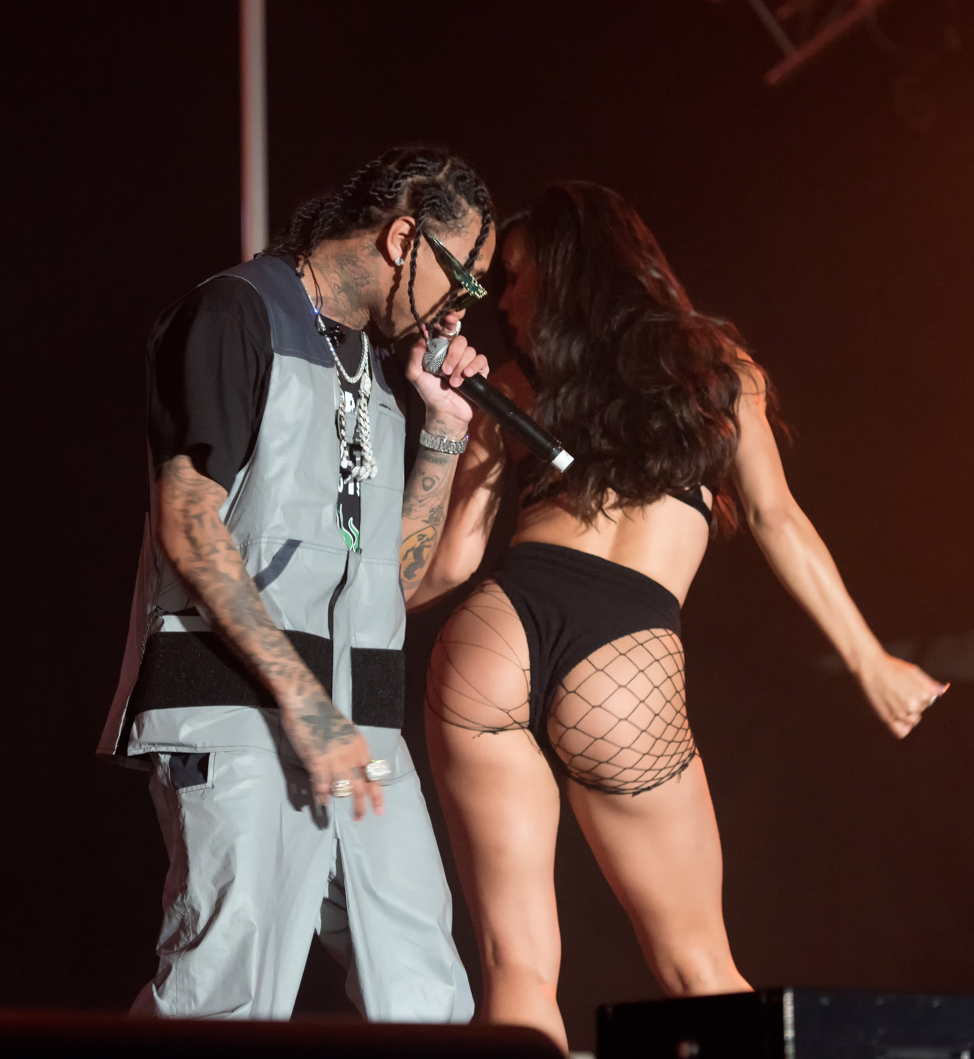 Tyga live auf dem Openair Frauenfeld 2019